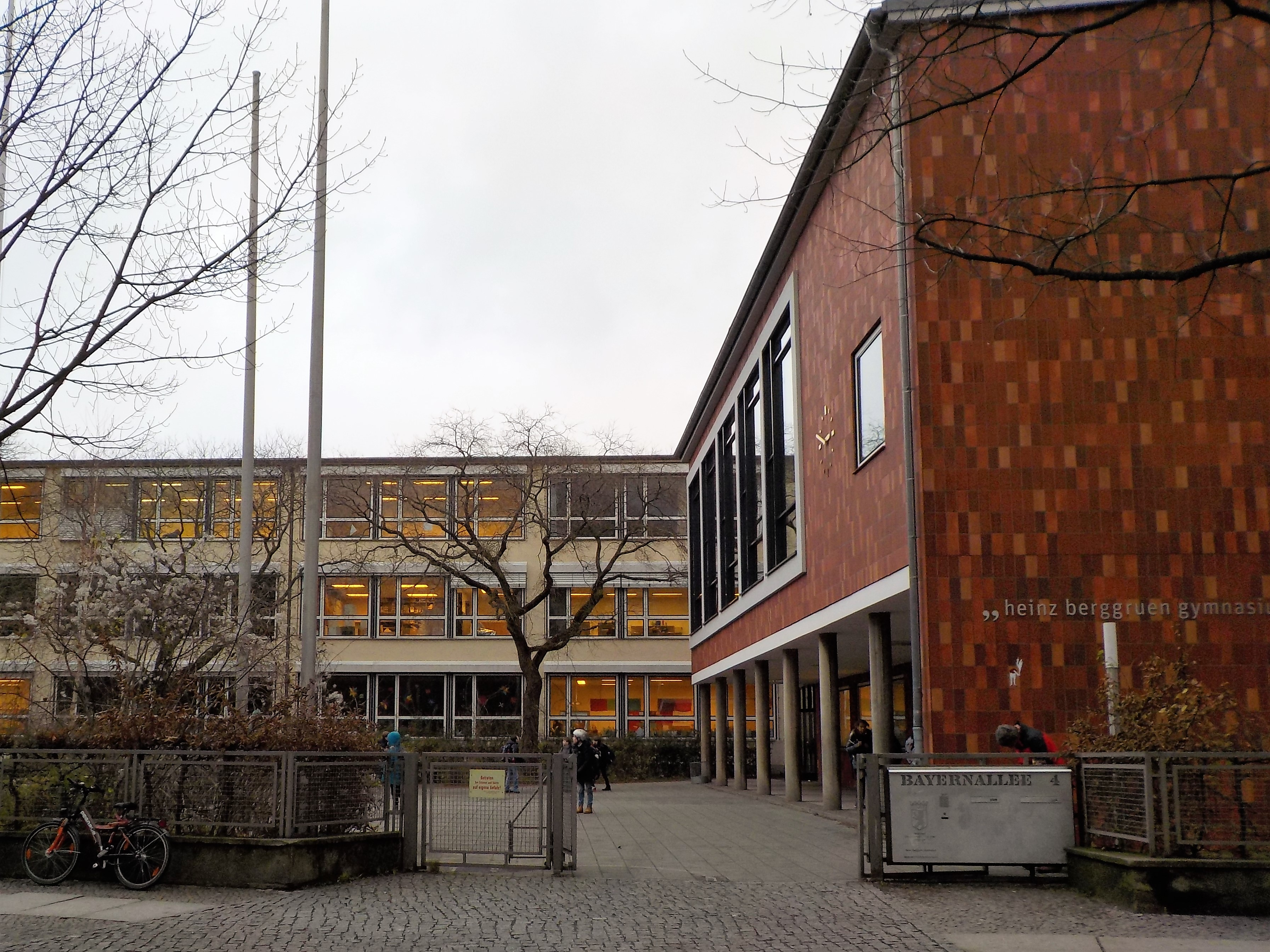 Das Heinz-Berggruen-Gymnasium in Berlin-Charlottenburg.